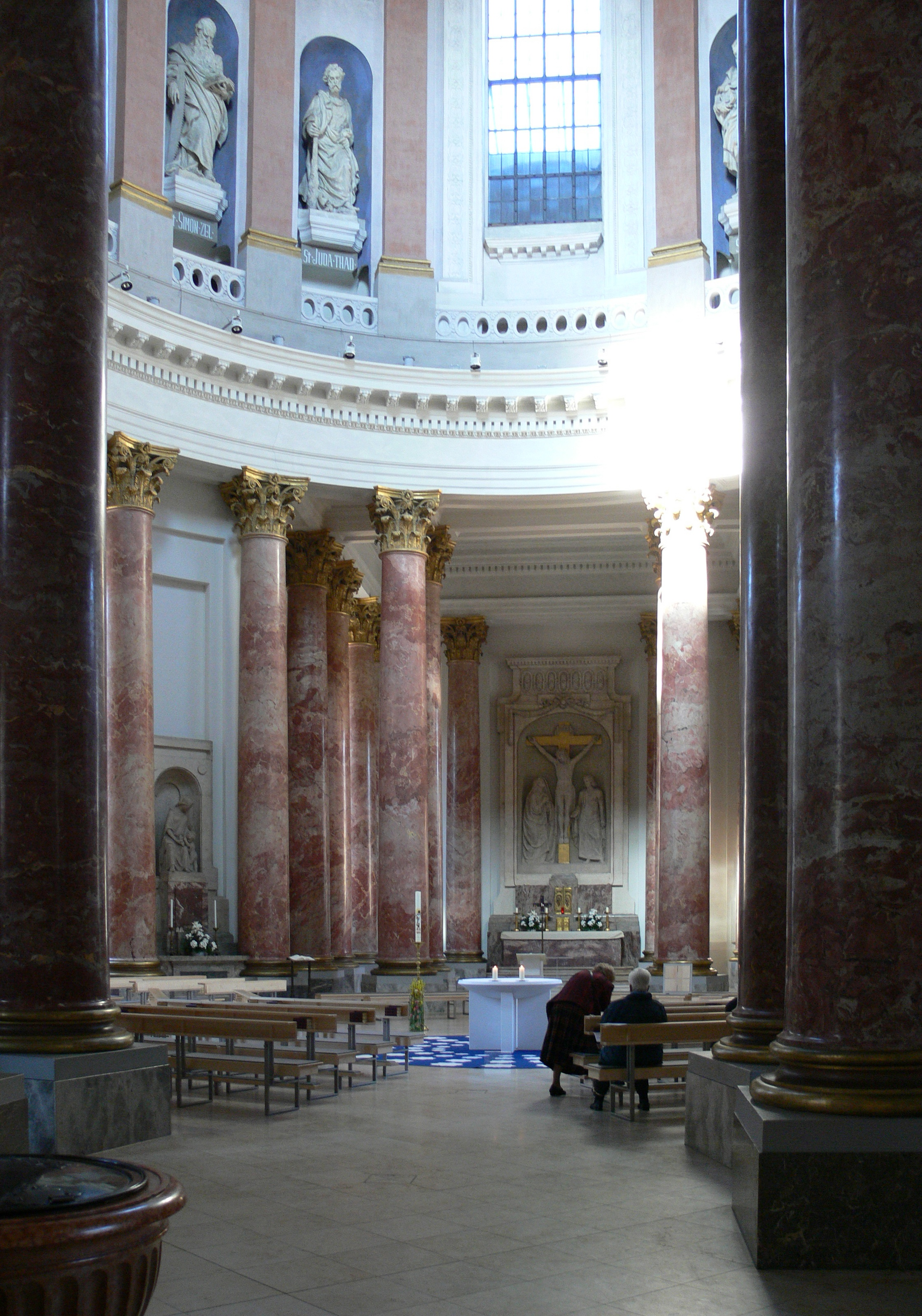 Nürnberg, Kath. Kirche St. Elisabeth, Innenansicht